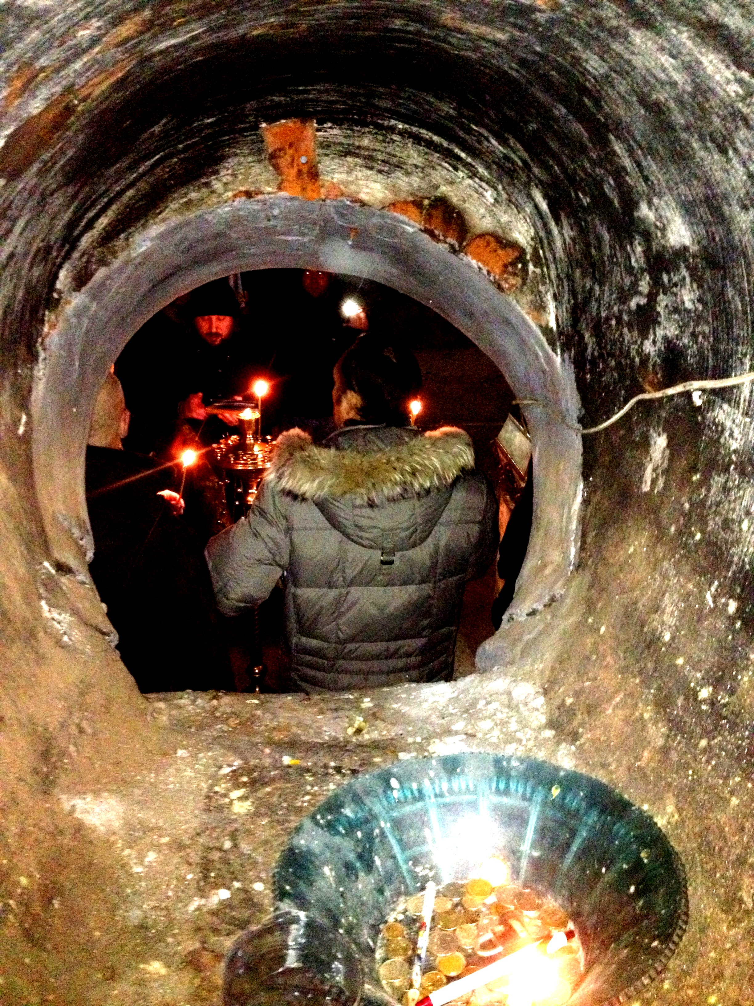 Служба в церкви-усыпальнице в честь преподобного Илии Муромца, расположенной под Храмом-памятником воинам, павшим при взятии Казани в 1552 году (Храмом-памятником в честь Нерукотворе́нного Образа Спасителя) (г. Казань).